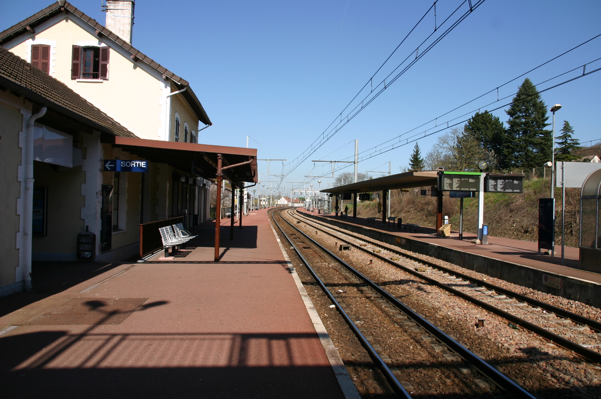 La gare de La Ferté-Alais, La Ferté-Alais, département de l'Essonne (France)